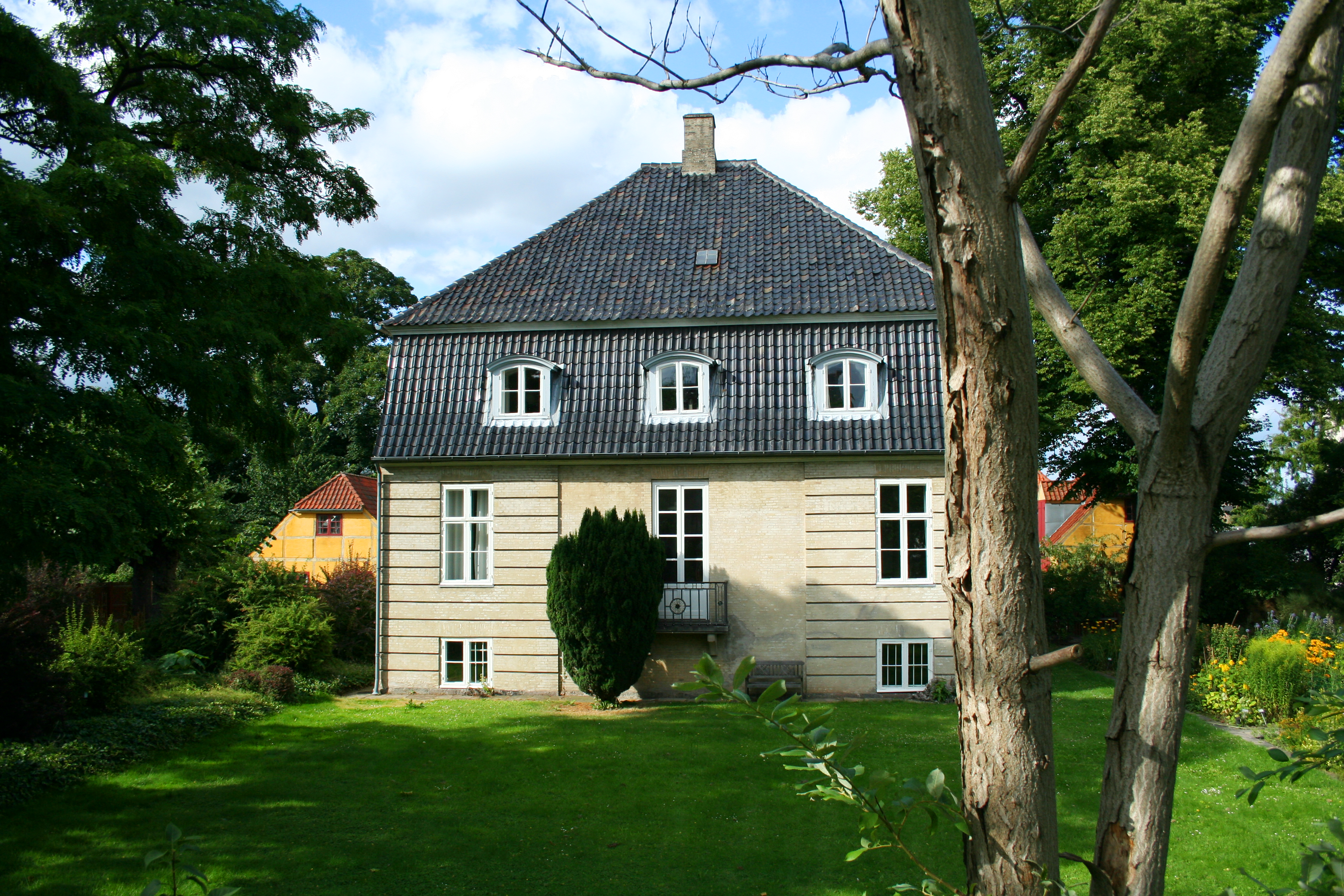 Landstedet Rolighed på Frederiksberg, bygget i 1770.